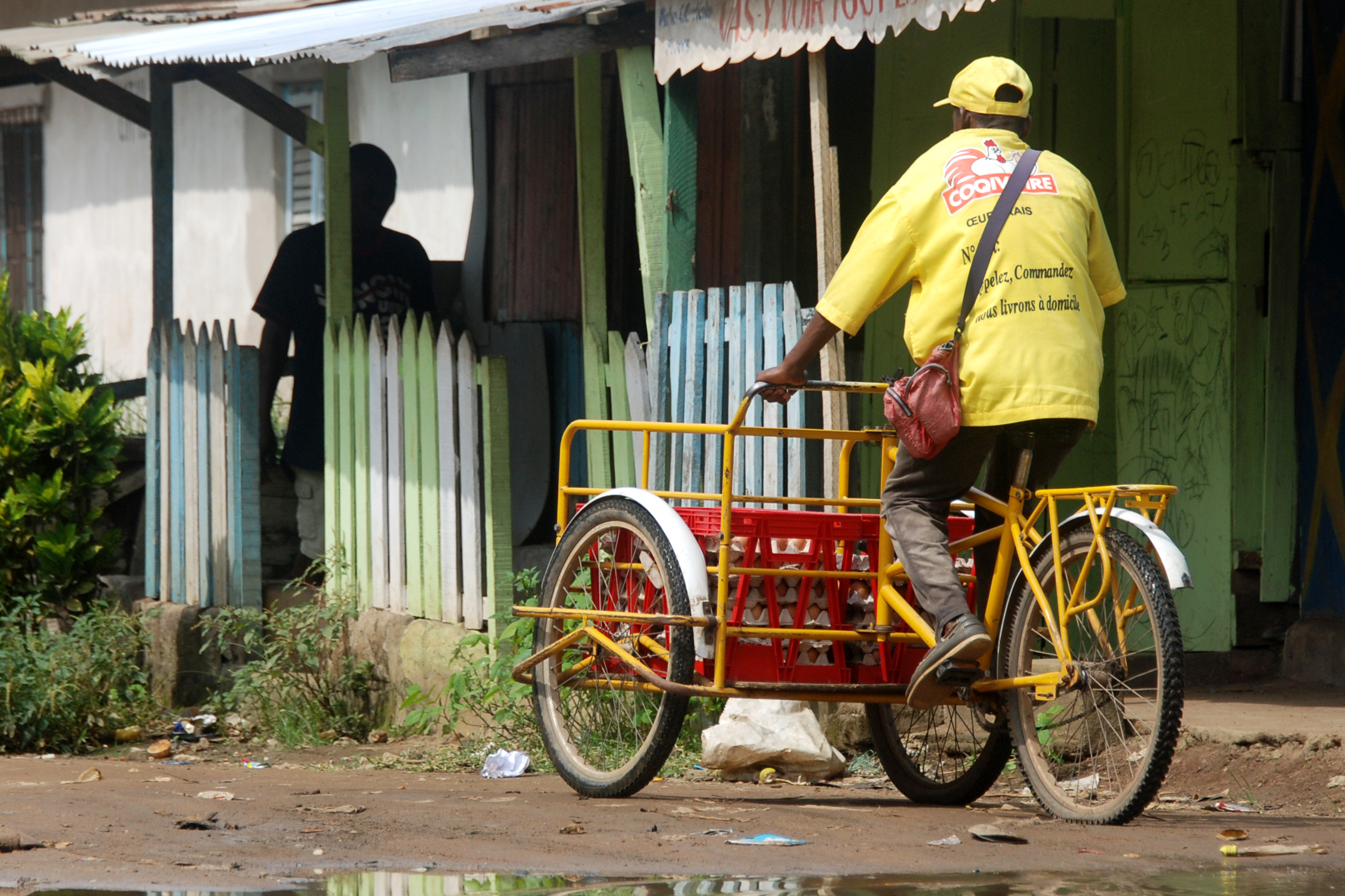 Livreur d’œufs frais dans les rues d'Abidjan This is an image of "African people at work" from Ivory Coast